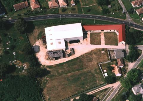 Bakonygyirót, Hungary, aerial photography